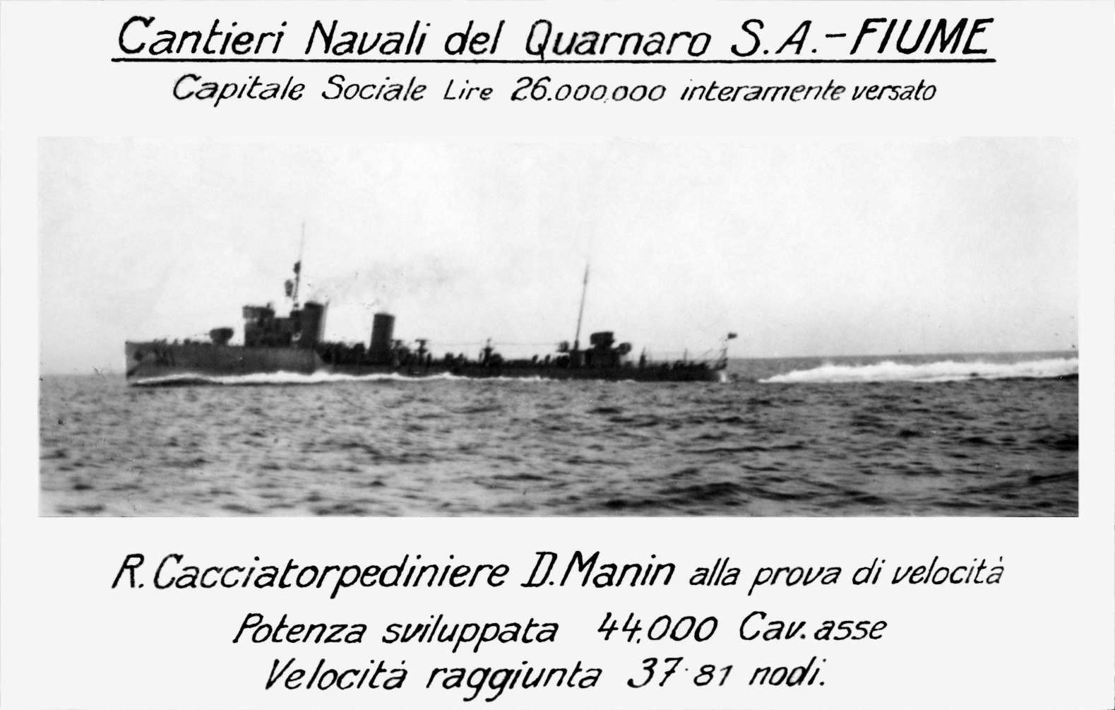 Regio Cacciatorpediniere Daniele Manin alla prova di velocitàBuilt at Cantieri Navali del Quarnaro, Fiume